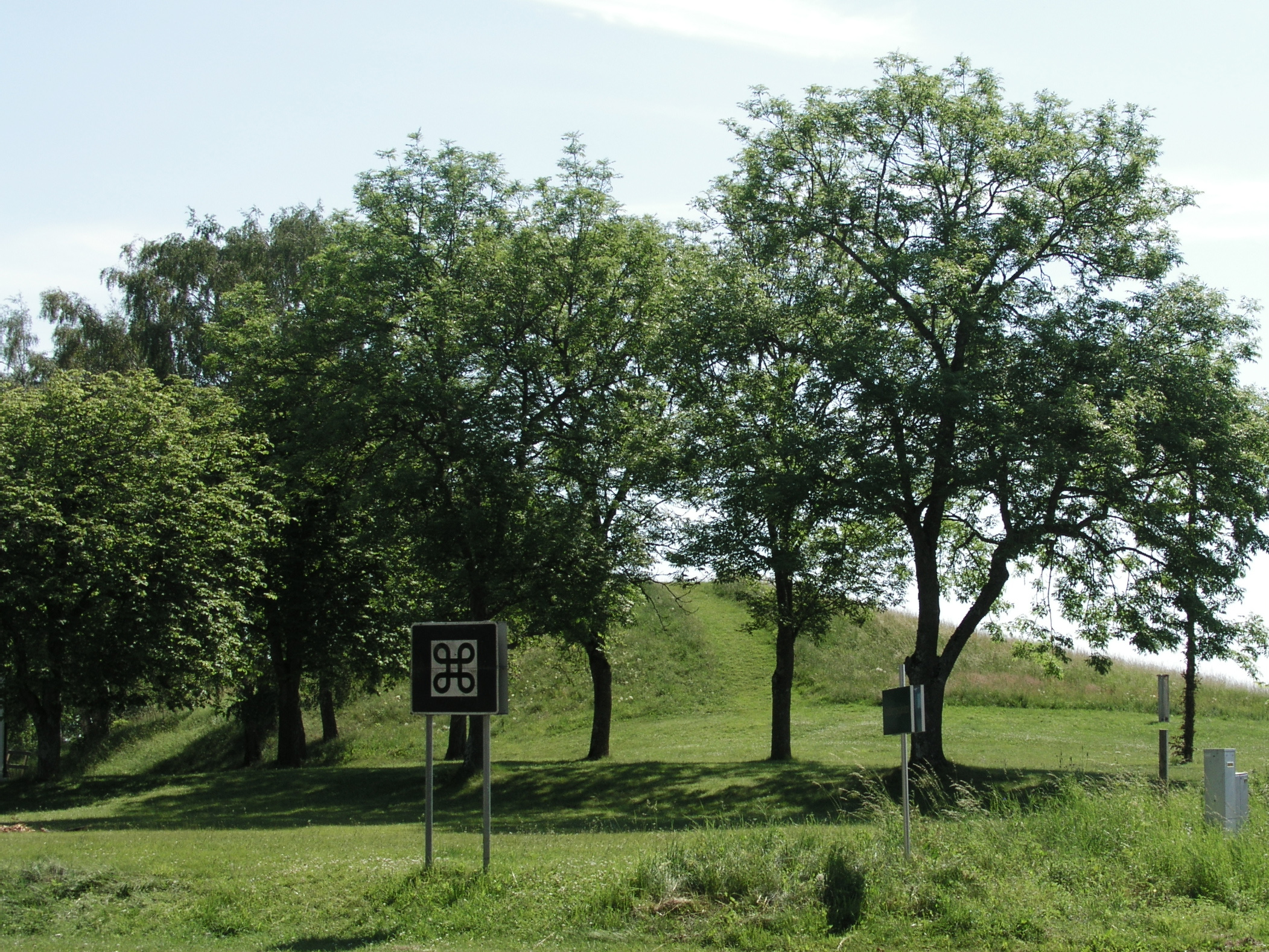 Gravhögen Ledbergshögen eller Ledbergs kulle i Östergötland.